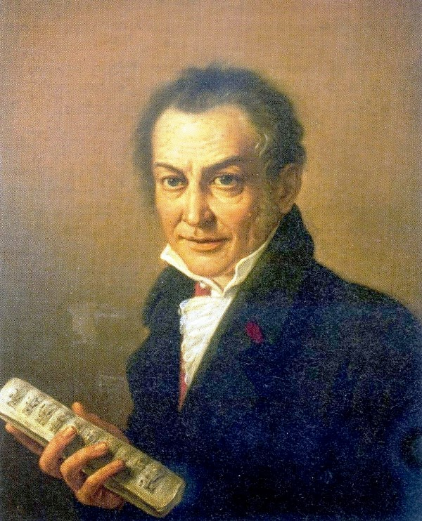 Ritratto del musicista Niccola Zingarelli per Costanzo Angelini (1760 1853)